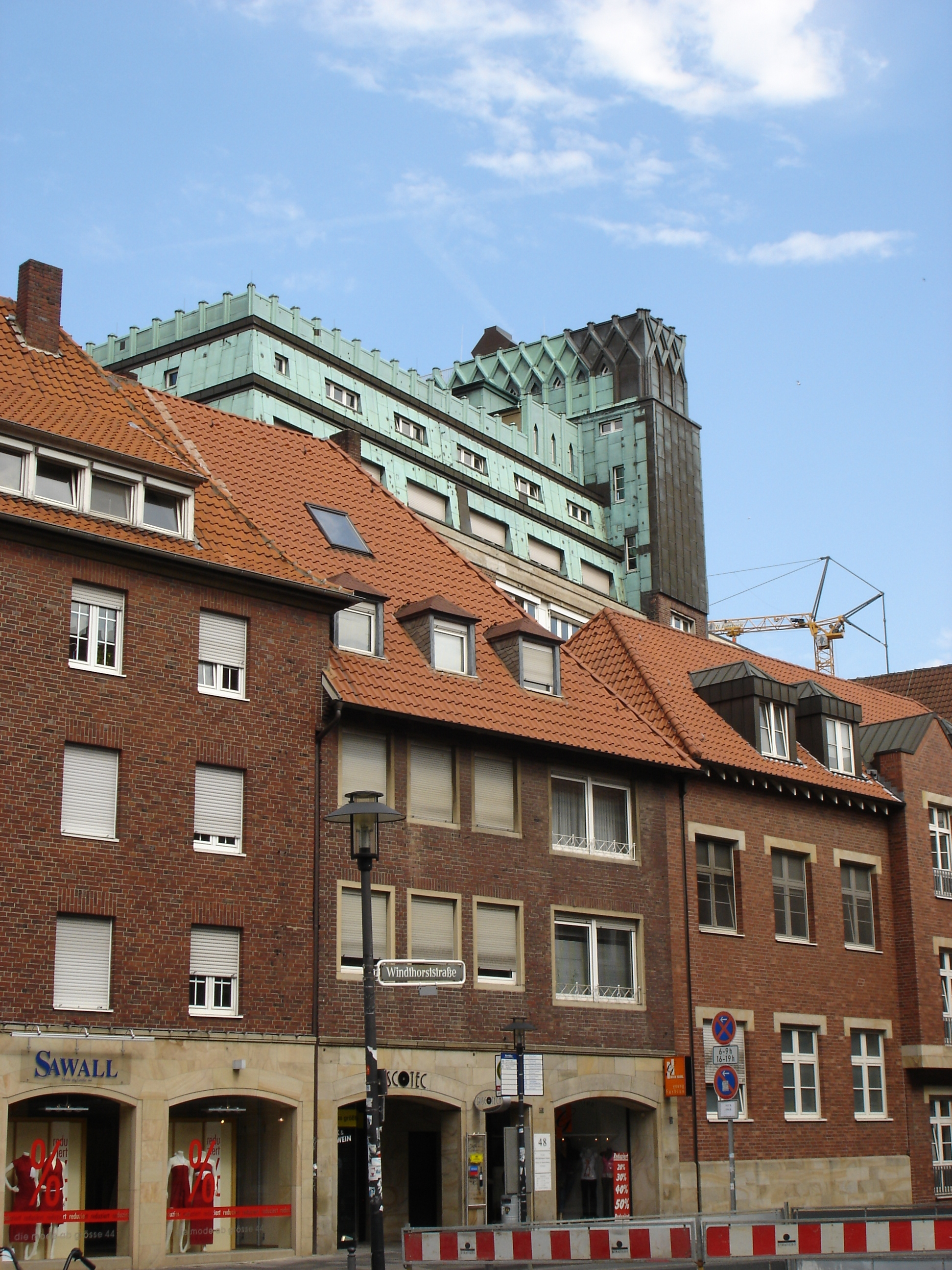 Denkmalgeschütztes Hochhaus des Altbaus der Raphaelsklinik in Münster, Westfale, Deutschland. An der Stelle der dunklen Kupferbleche hing bis zum Zweiten Weltkrieg eine 9m hohe Madonnen-Statue